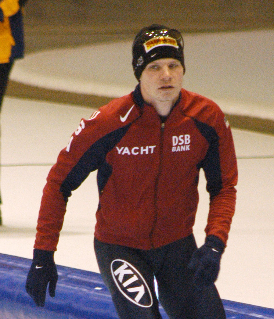 Tucker Fredricks (USA) at a world cup speedskating in Heerenveen, the Netherlands.